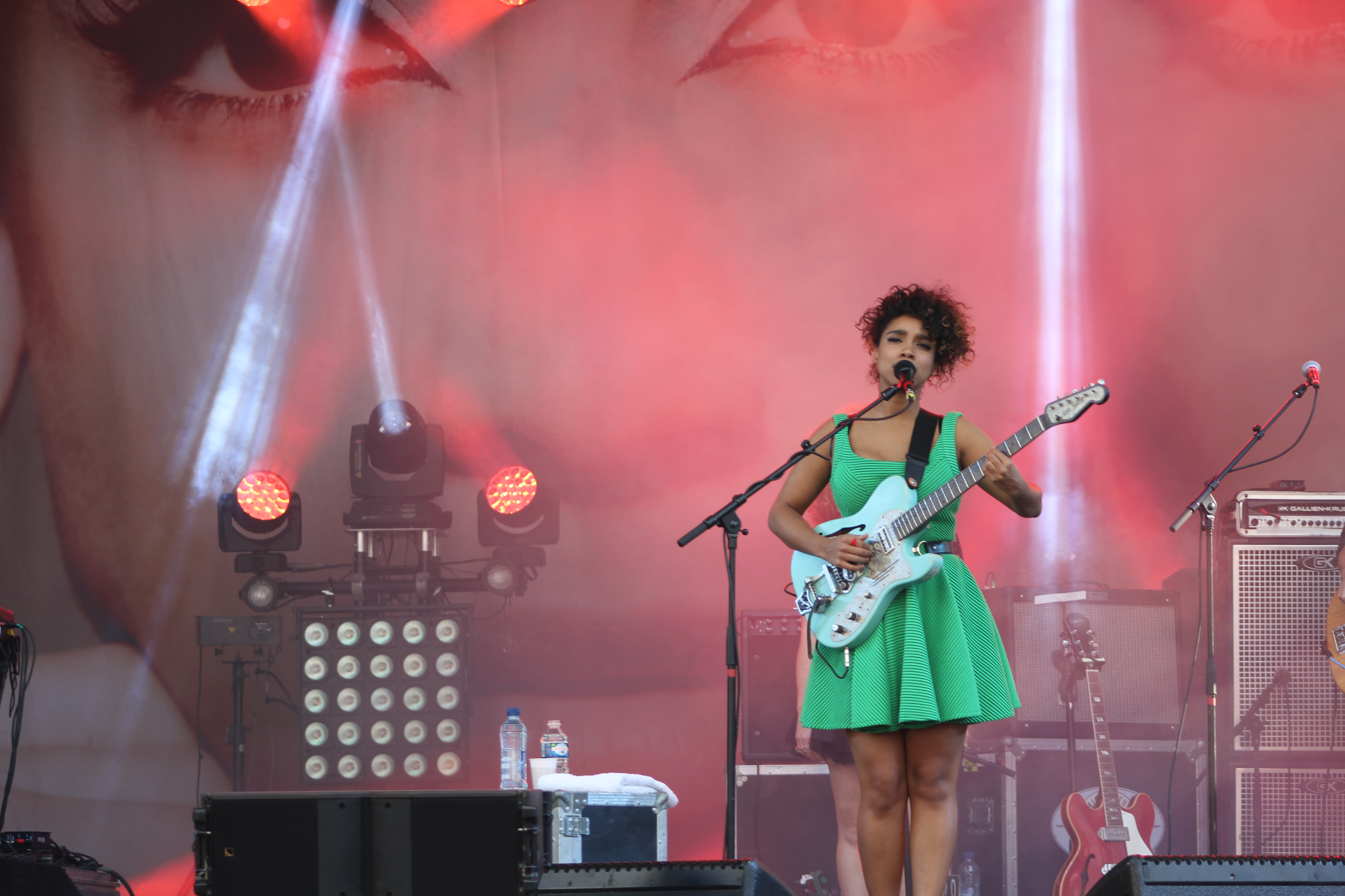 juin 2013 Lianne La Havas Festival rock de tourcoing